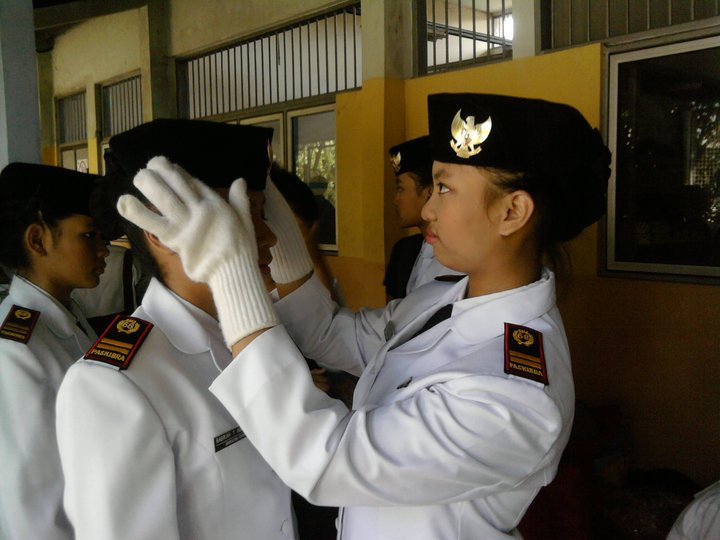 paskibra bertugas